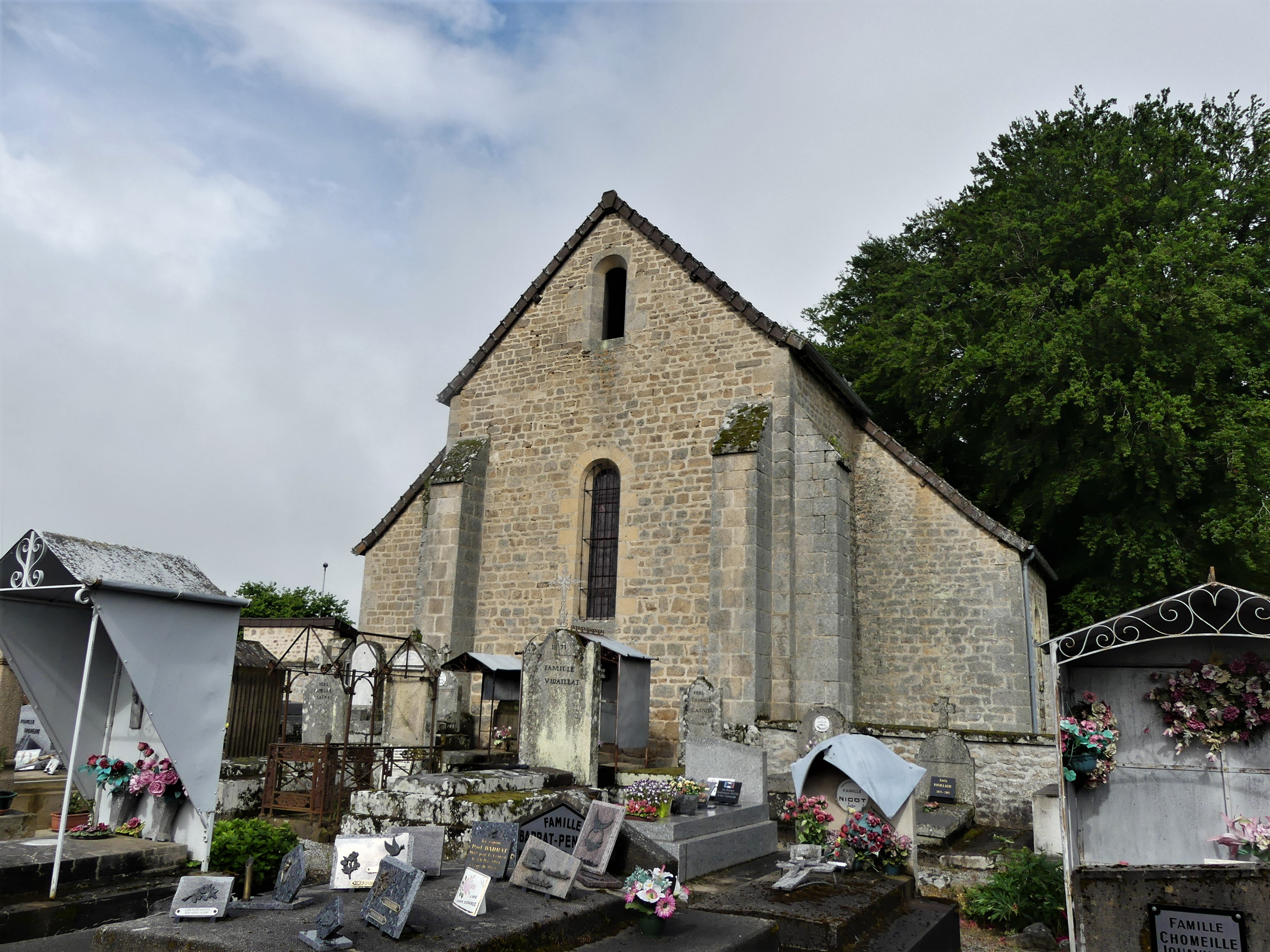 L'église de La Pouge et son cimetière, Creuse, France.